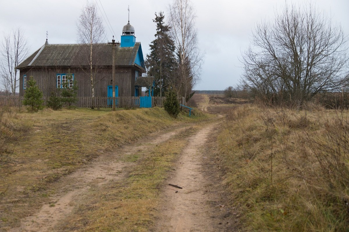 Вардамічы. Дарога ля царквы